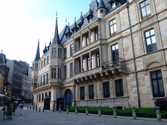 Photo prise en 2005 par moi-meme au Luxembourg Pas de droit d'auteur étant le photographe.